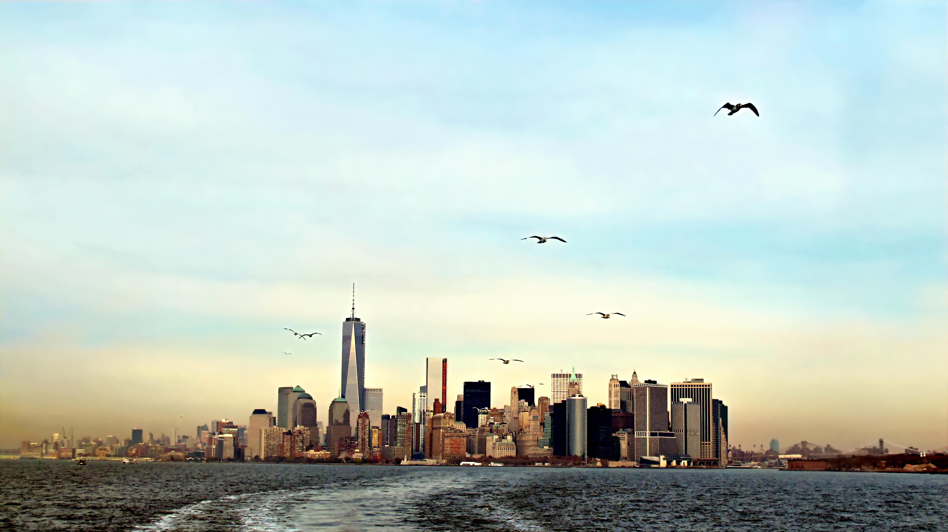 Manhattan, New York City